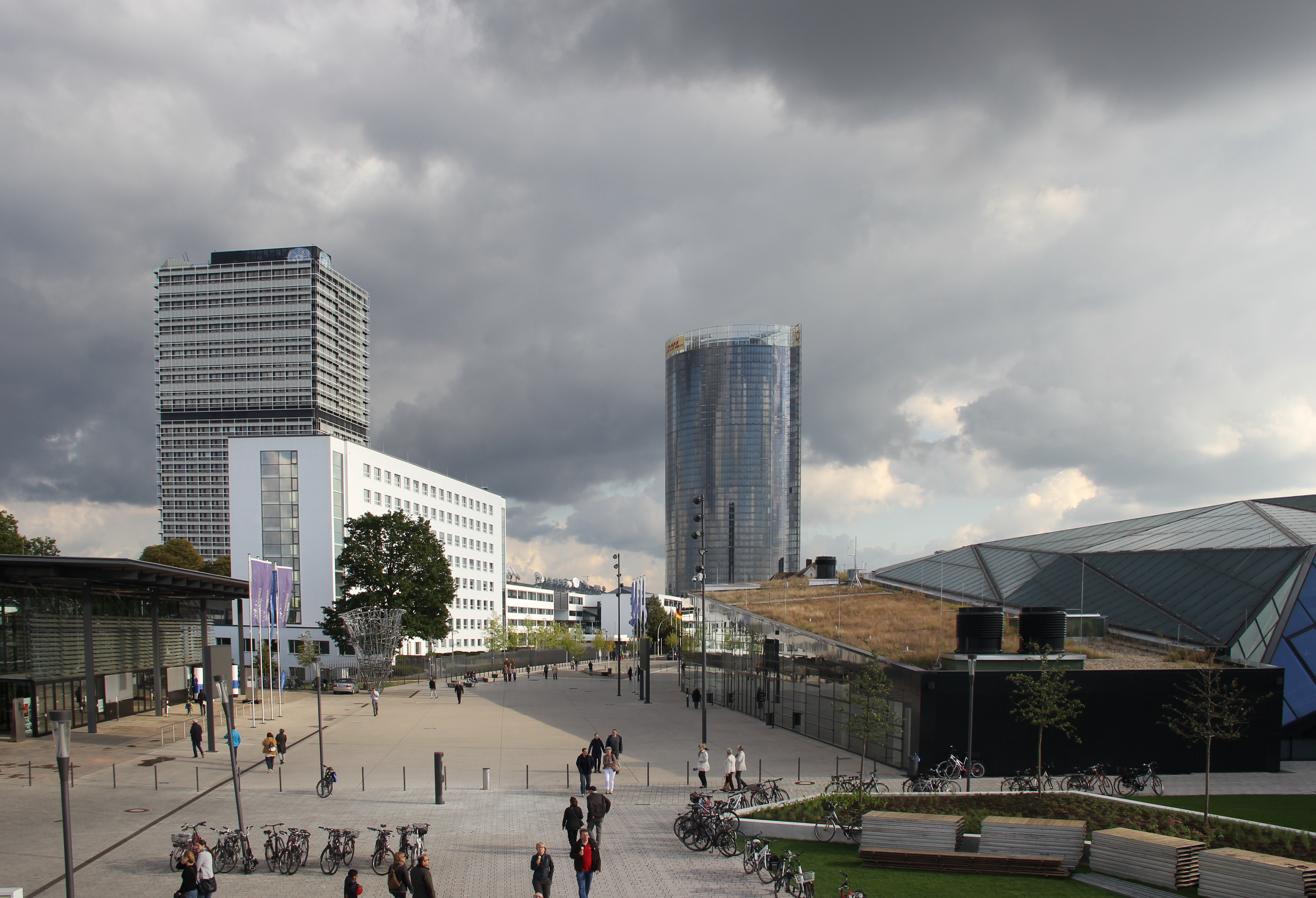 Bonn Marriott World Conference Hotel, Blick auf den Platz der Vereinten Nationen.